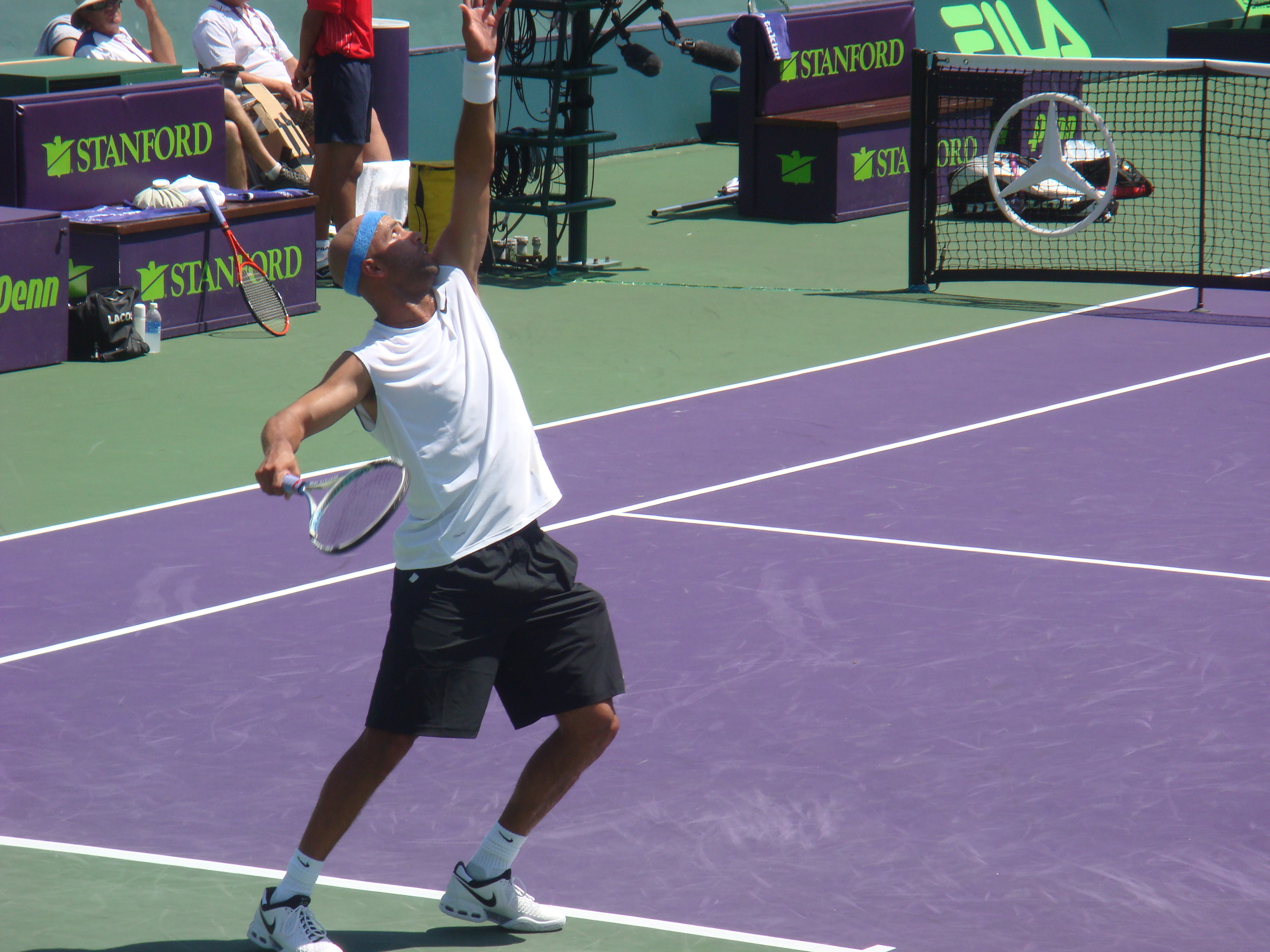 Blake vs Santoro @ Miami, March, 2008